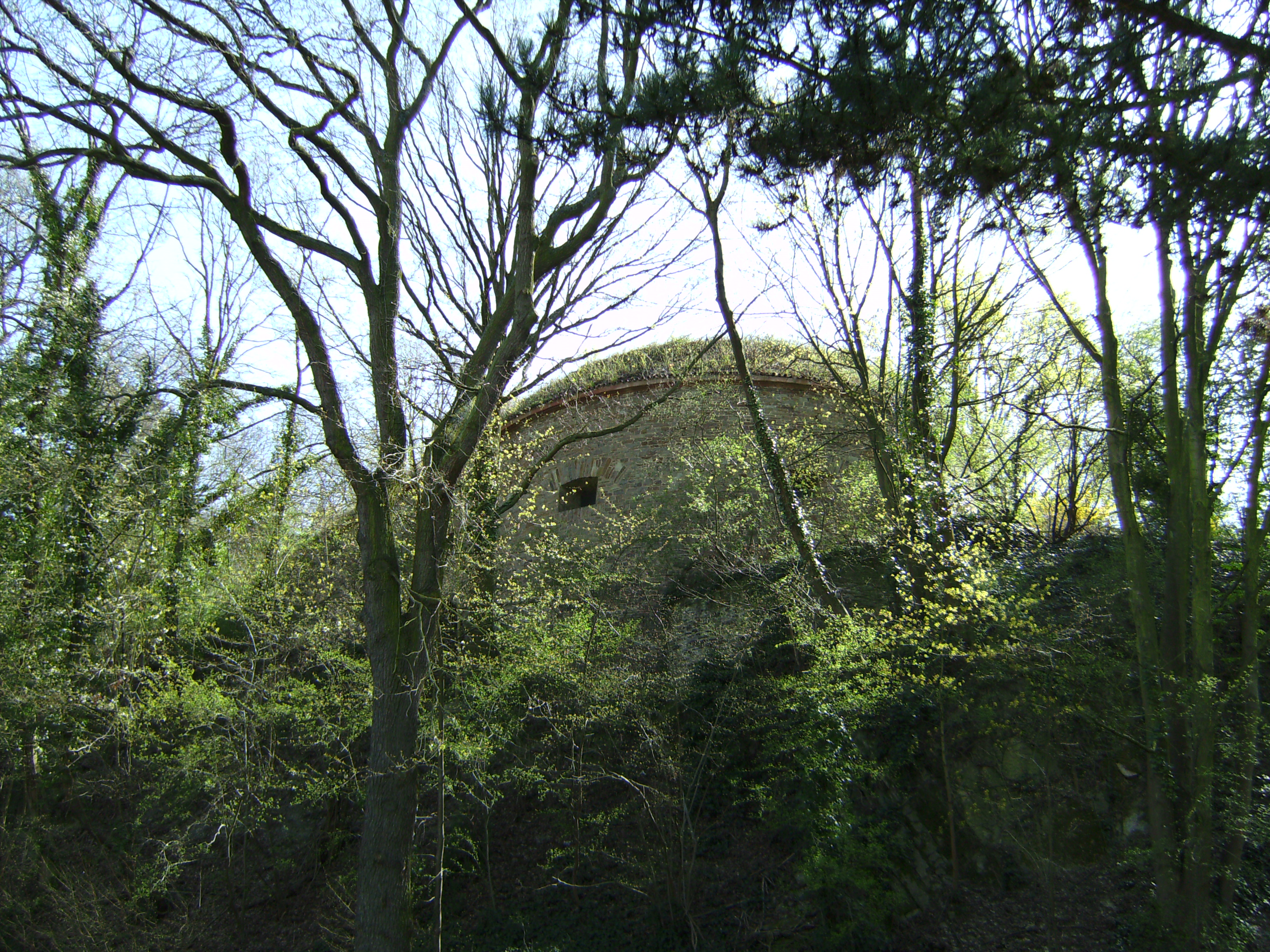 Batterie Hübeling in Koblenz; Batterieseite